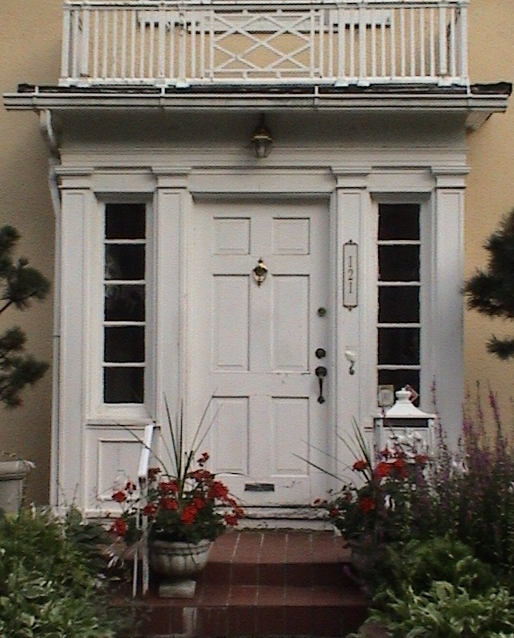 A nice door Kew Gardens